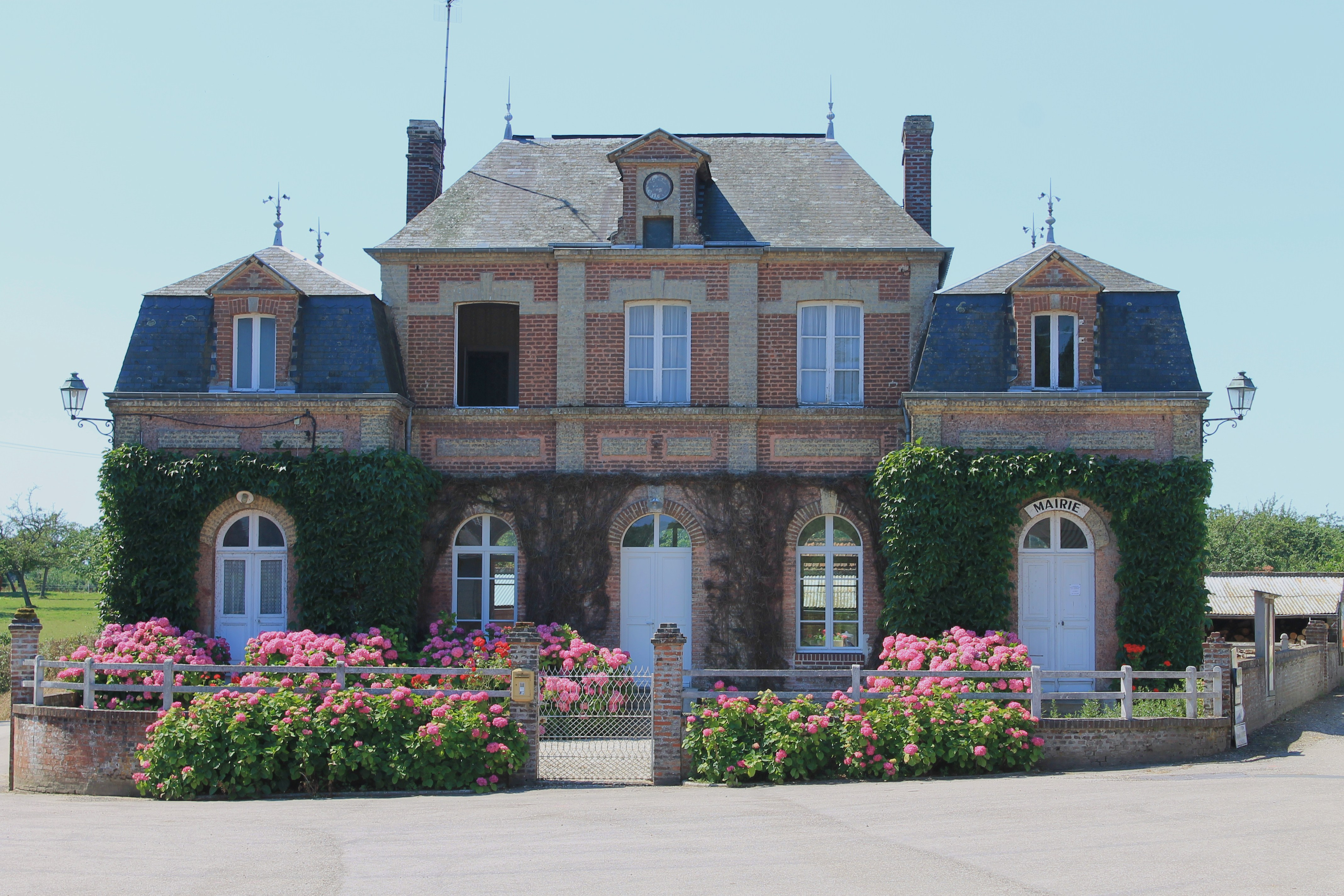 Mairie de Saint-Pierre-Azif (Calvados)